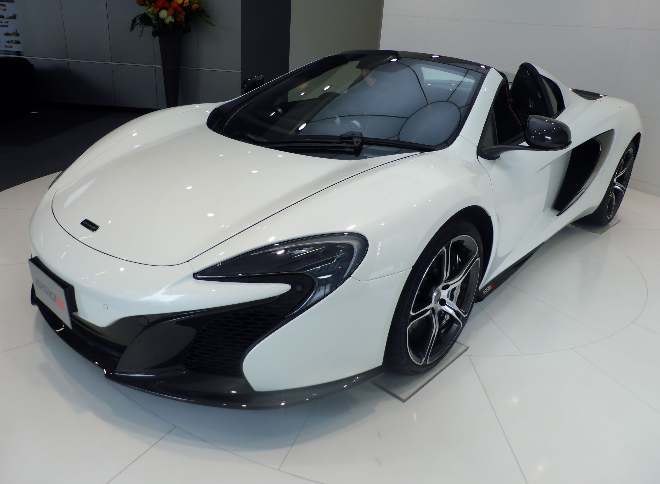 マクラーレン・650Sスパイダーをフロントから撮影。